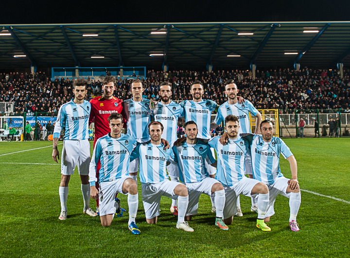 Formazione iniziale dell'A.S. Giana Erminio in occasione della gara interna contro l'Unione Venezia, valida per il campionato di Lega Pro 2014-2015